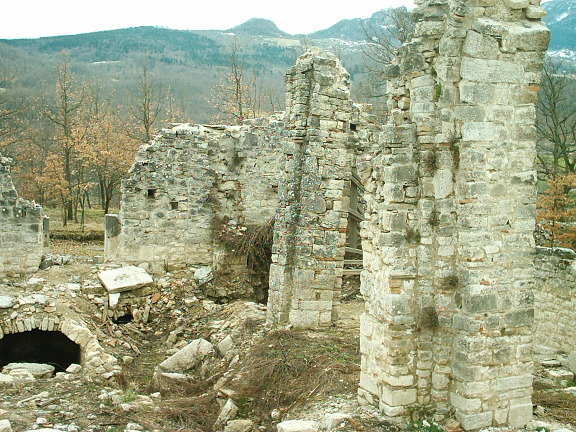 Foto scattata da Giuliano Oreste D'Amico alias Rafaniello